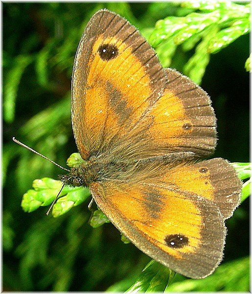 Galicia (Spain). Bolboreta dourada